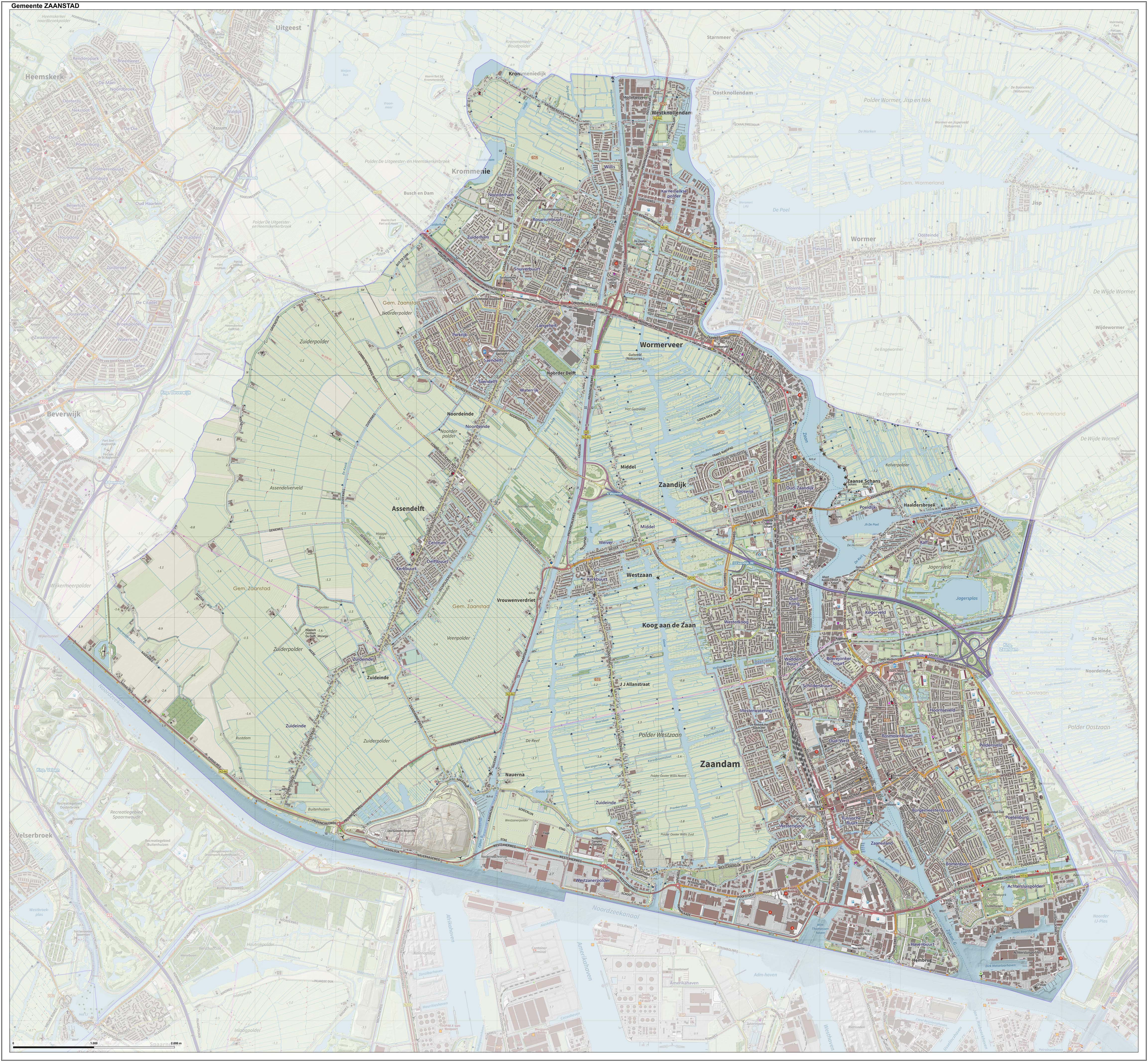 Topografische gemeentekaart. Resolutie: 400 pixels/km. Kaartbeeld samengesteld uit de open geodata van de Top10NL en Top25namen (Kadaster), Creative Commons-BY licentie. Gebouwvlakken uit open geodata BAG extract. Wegen uit de OpenStreetMap, OpenStreetMap community. Reliëfschaduw uit de Actuele Hoogtekaart AHN2. Samenstelling en kleurenschema: Jan-Willem van Aalst, met QGIS. Zie ook de Legenda.